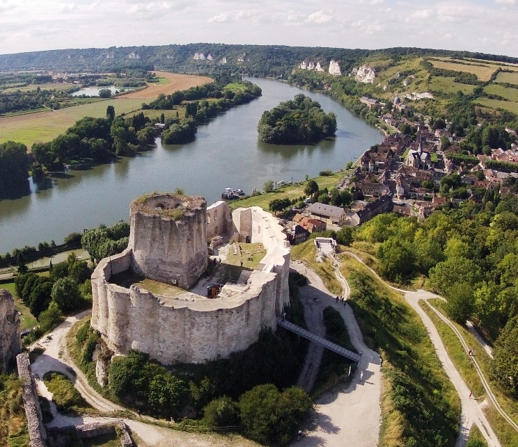 « Que voilà un château gaillard * ! » aurait dit de lui Richard Cœur de Lion, qui l'a fait construire à la toute fin du XIIème siècle (1198). Dominant stratégiquement la Seine et la ville des Andelys, comme on le voit bien sur cette prise de vue aérienne (Quadrocopter radio-commandé), Château-Gaillard est un pur chef-d'oeuvre d'architecture militaire médiévale. "Bien fortifié"